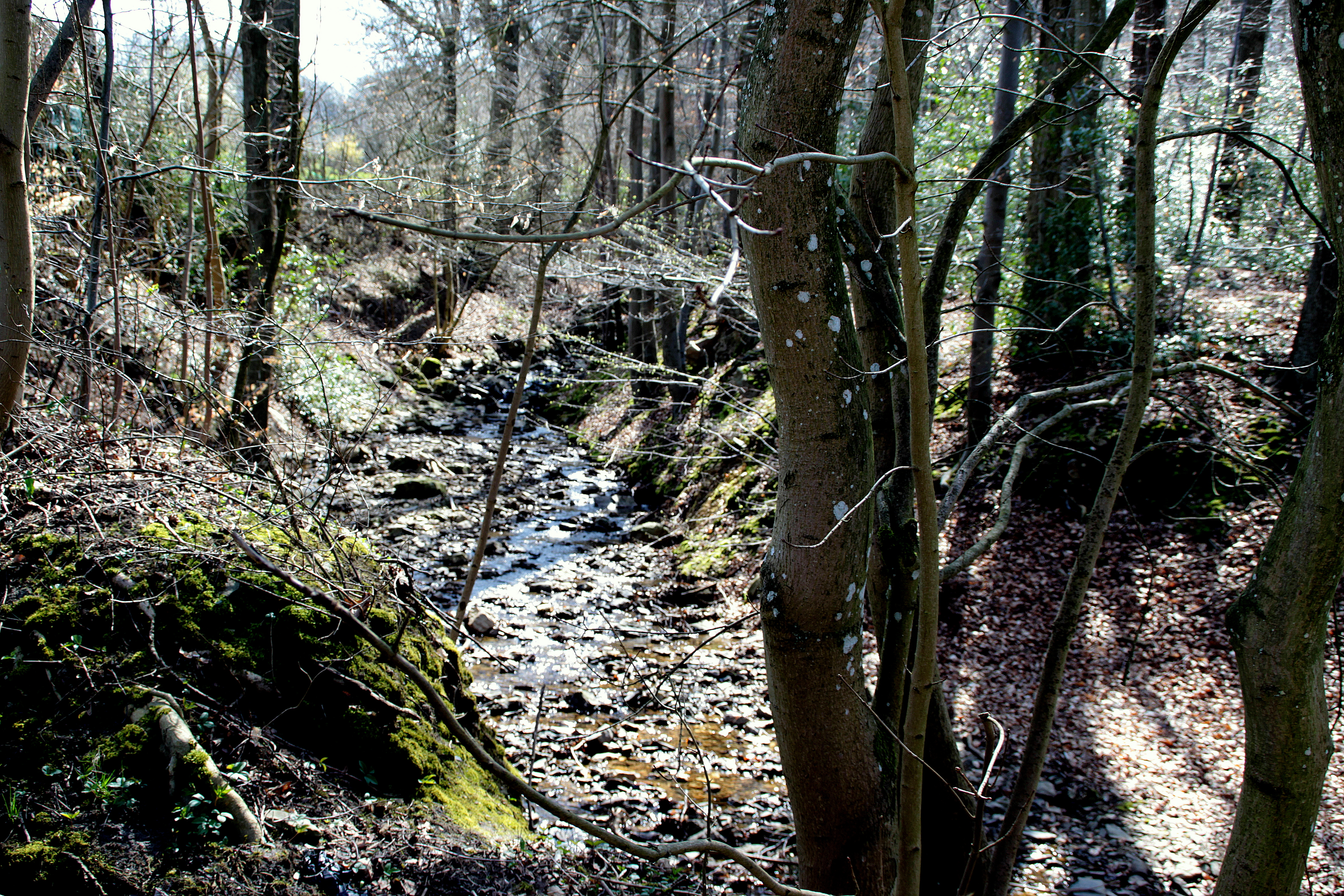 De Soyeuru zu Nivezé